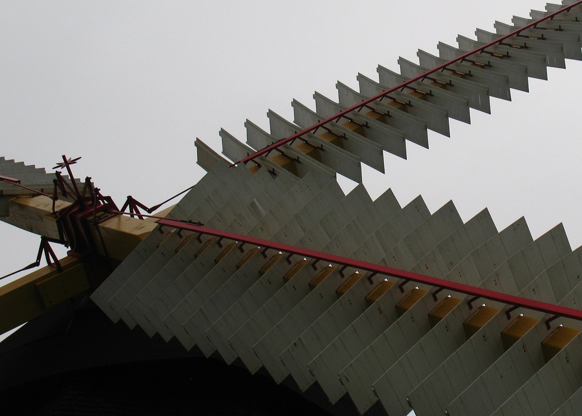 Grubbe Vindmölle, vinger og klapperne Grubbe Møllegyden2 - 5600 Faaborg Eget foto, Noorse Licentie: CC-BY-SA-3.0 Forminsket versjon for Wikipedia